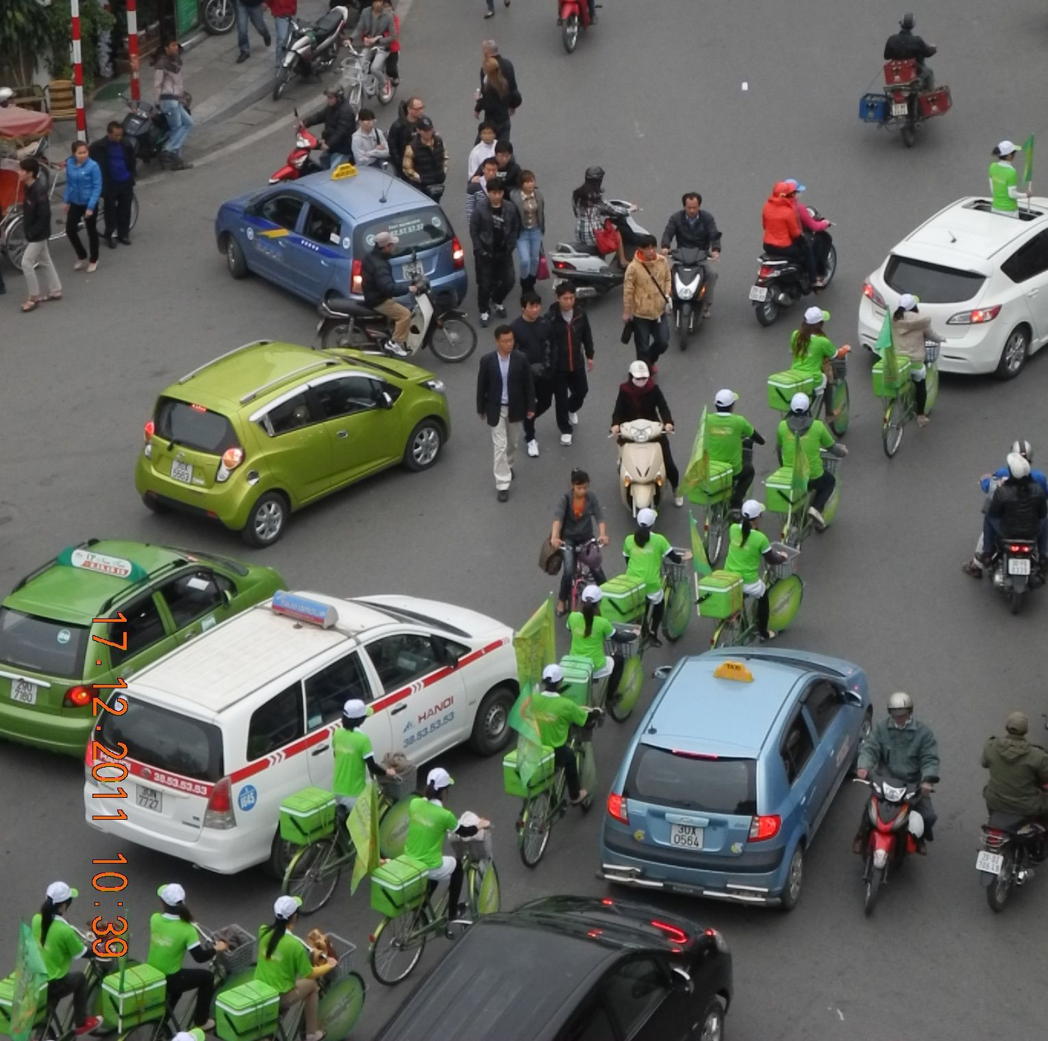 Hanoi-Straßenverkehr06